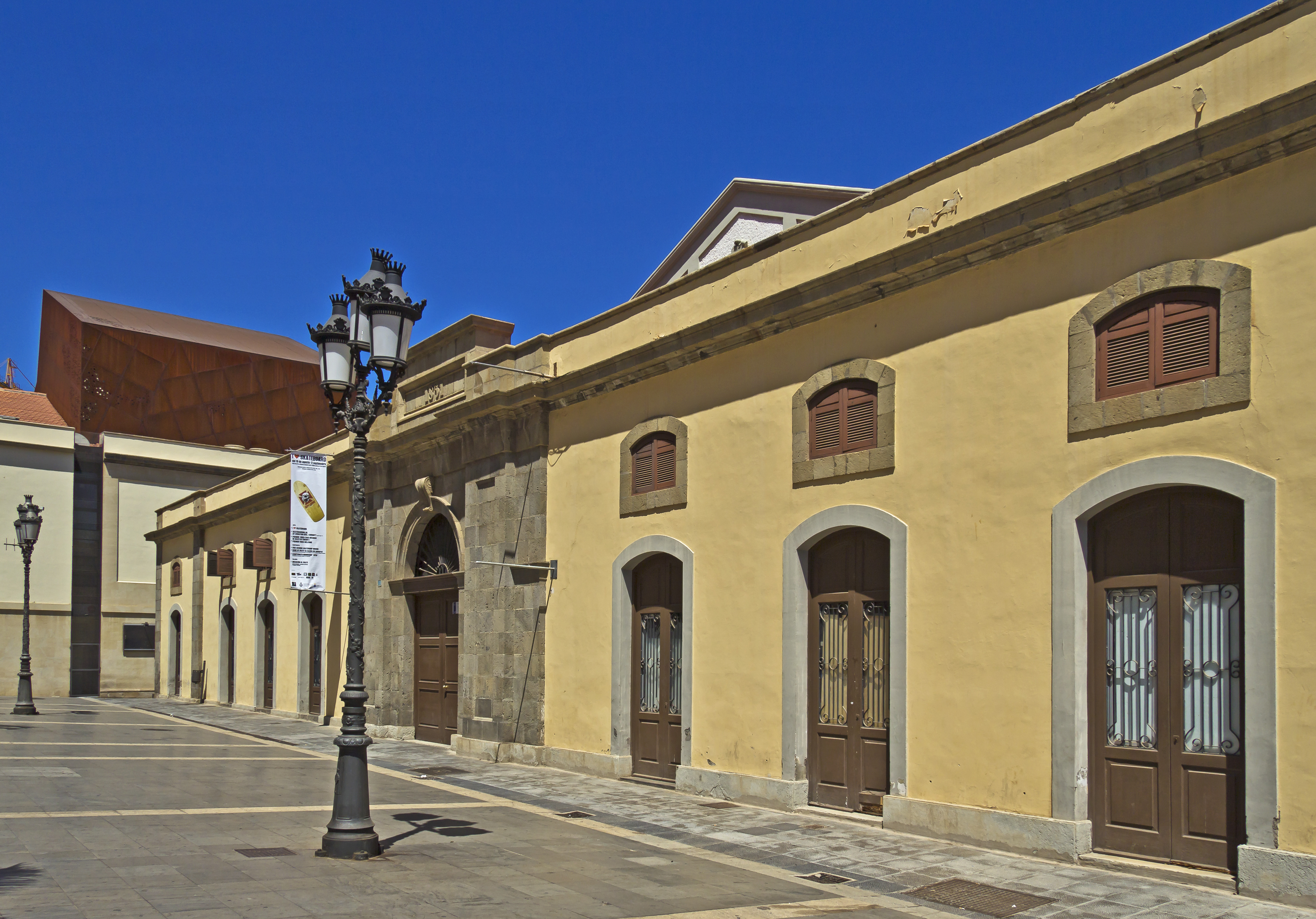 Westseite des Centro de Arte La Recova; an der Plaza de la Isla de Madeira in Santa Cruz de Tenerife (Spanien) wurde ab 1847 eine Markthalle gebaut, der Architekt war Manuel Oraá y Arcocha, das Gebäude wird heute von verschiedenen kulturellen Einrichtungen genutzt.